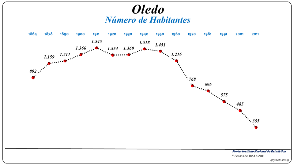 População